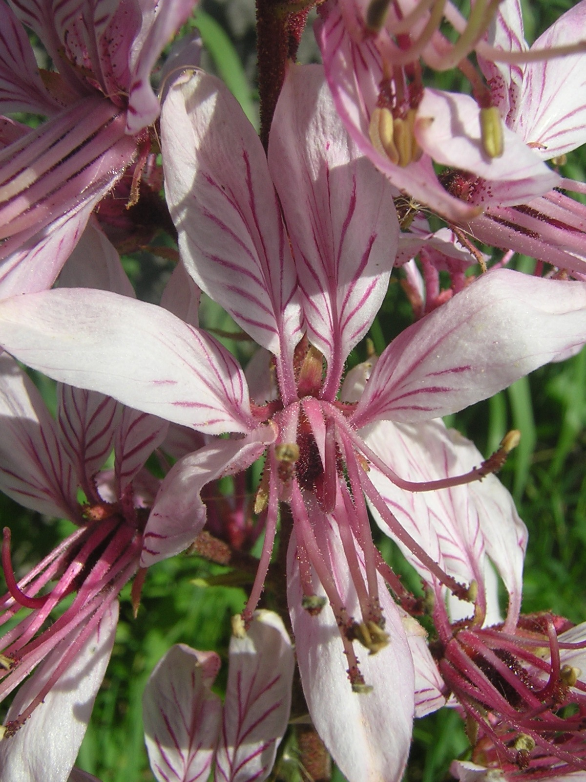 Dictamnus albus Ясенец белый, цветок. Савинский район Ивановской области, Россия.